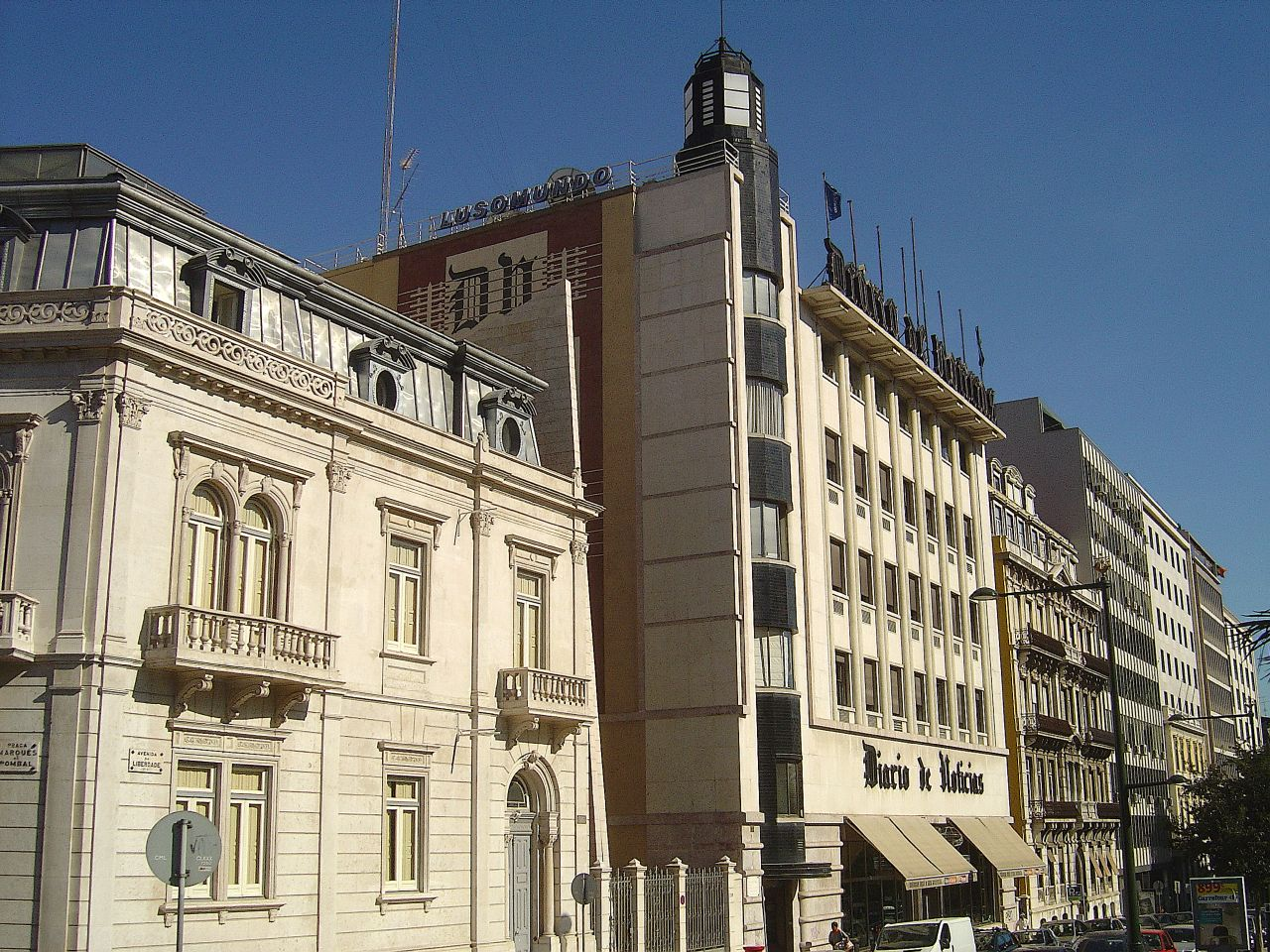 Avenida da Liberdade in Lisbon, Portugal